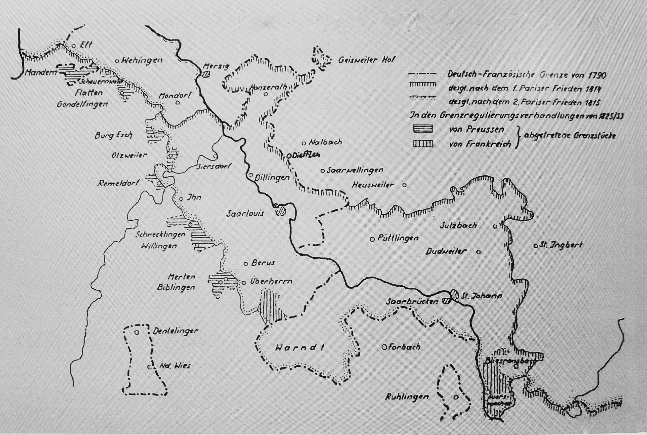 Historische Grenzziehungen in der Umgebung Diefflen in den Jahren 1790, 1814 und 1815 (nach einer Graphik des Historischen Vereins Wallerfangen)